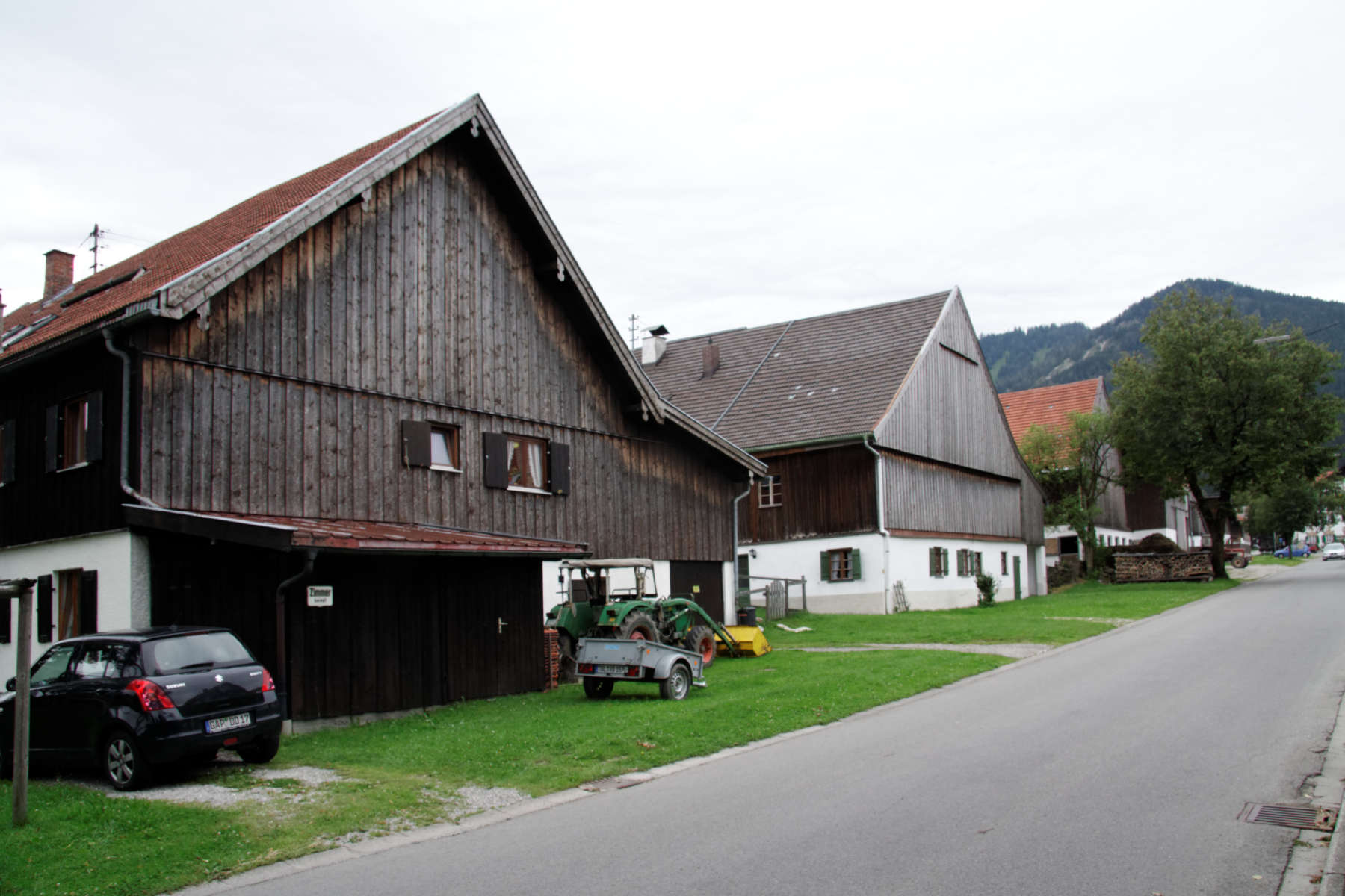 Unterammergau, Pürschlingstraße im denkmalgeschützten Ensemble Hinterdorf von Osten, Blick auf die auf der Nordseite der angrenzenden Bauernhöfe liegenden Wirtschaftsteile